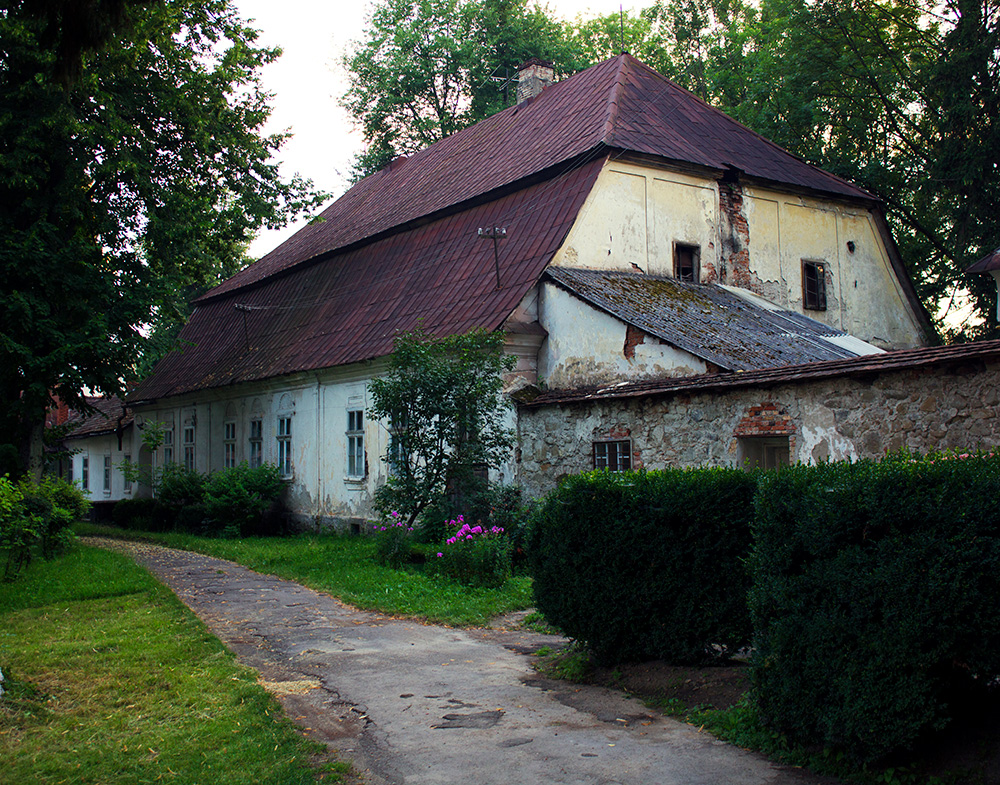 Палац Телекі - вигляд зсередини двору